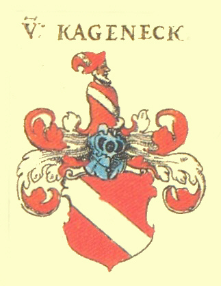 Wappen der Elsässischen Adelsfamilie Kageneck